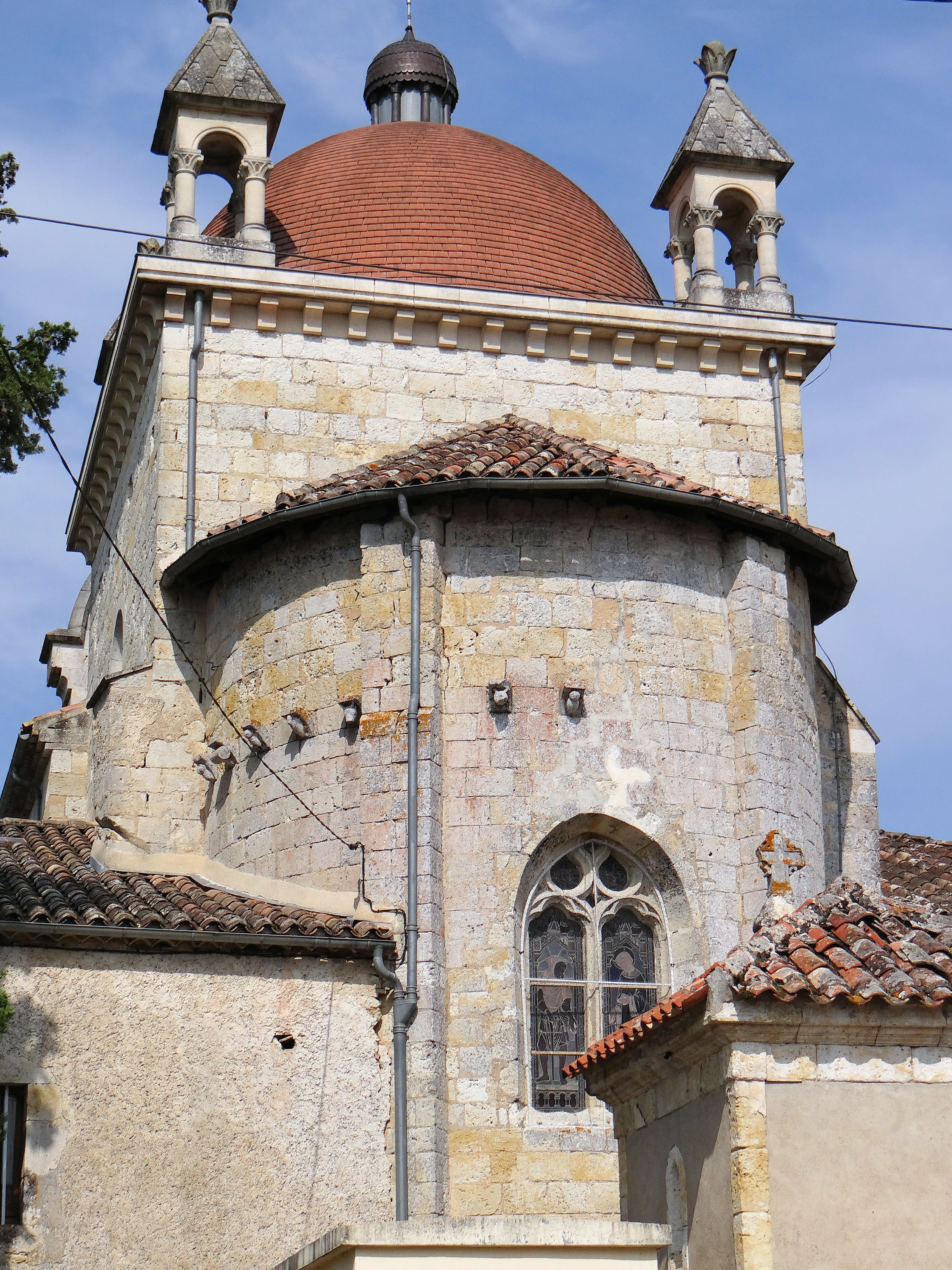 Sistels - Église Saint-Laurent - Chevet et coupole